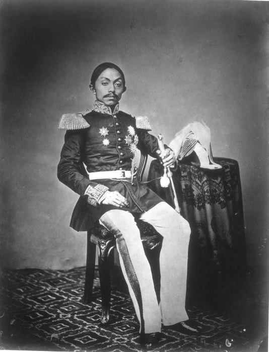 Foto. Paku Bewono IX, de susuhunan van Surakarta, Java.